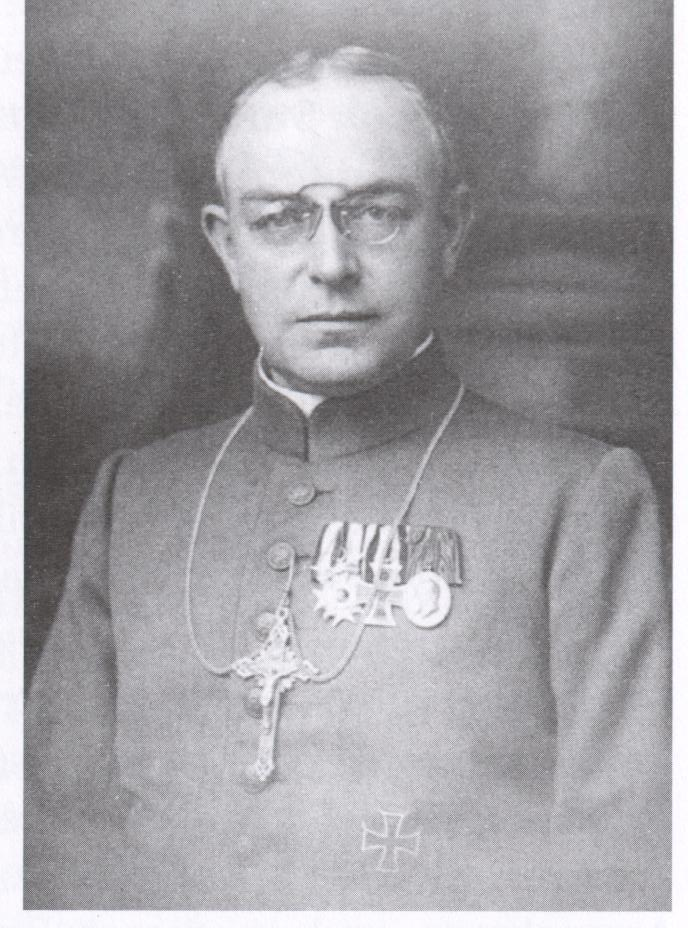 Dr. Anton Fooß, Prälat und Bayerischer Divisionspfarrer, Bistum Speyer